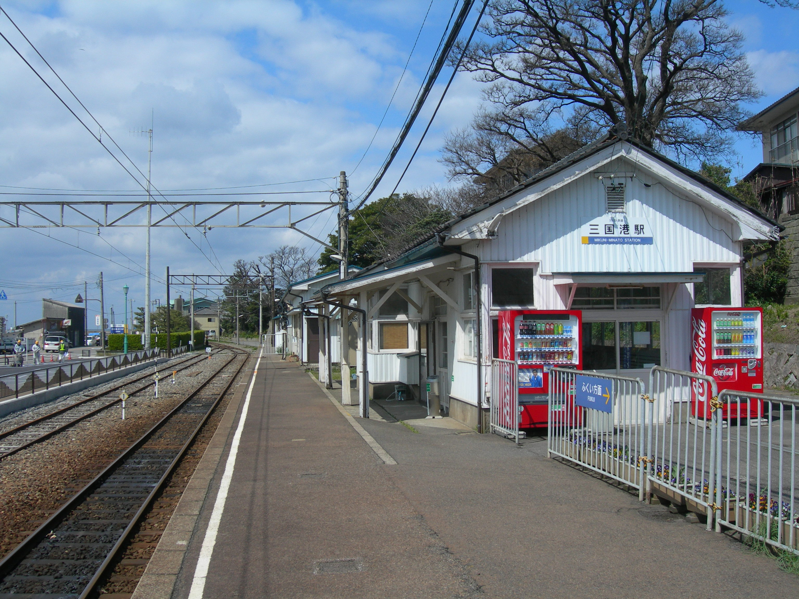 三国港駅ホーム